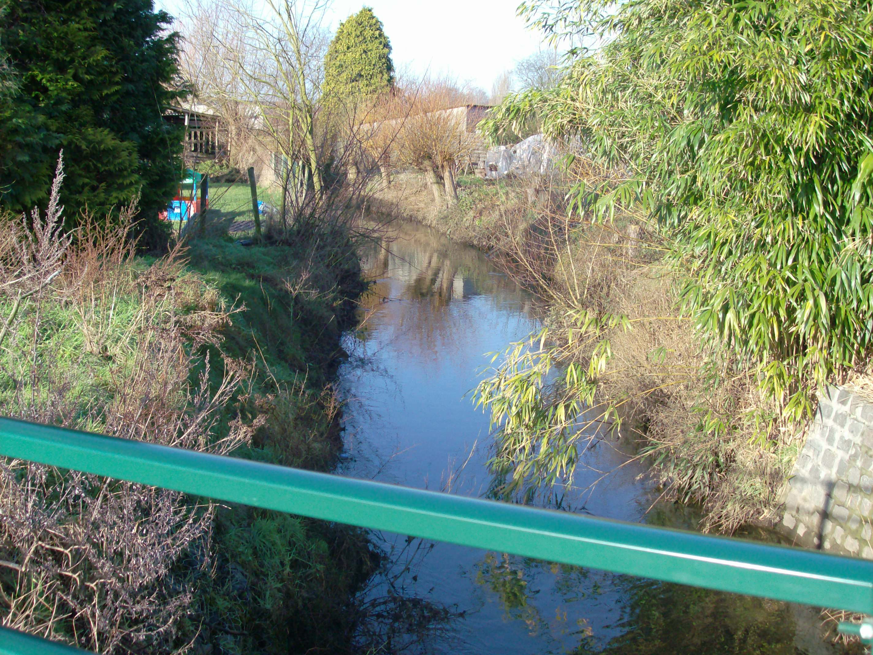 Ledebeek near Oudenbos, Belgium